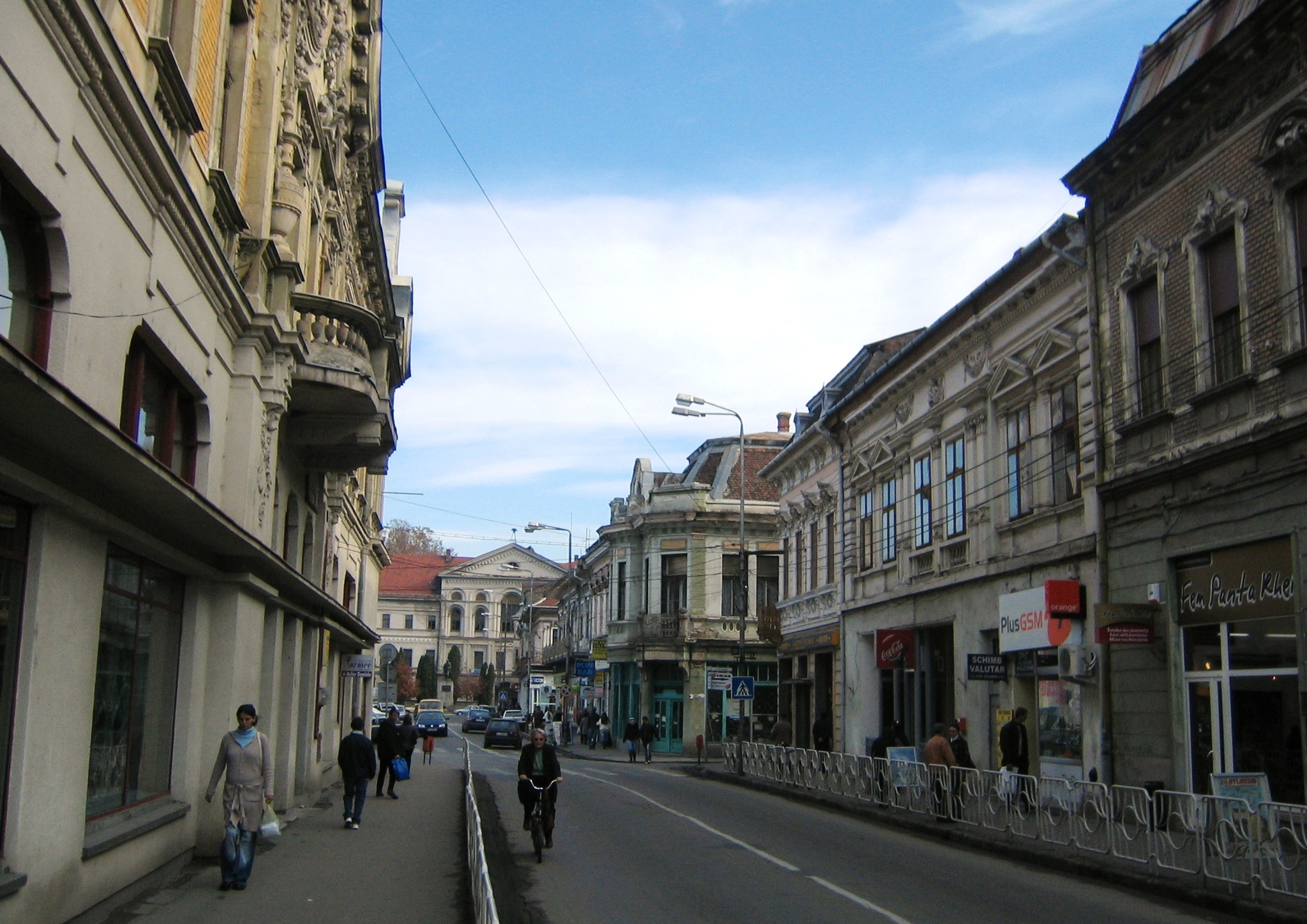 Main street, Lugoj, Romania